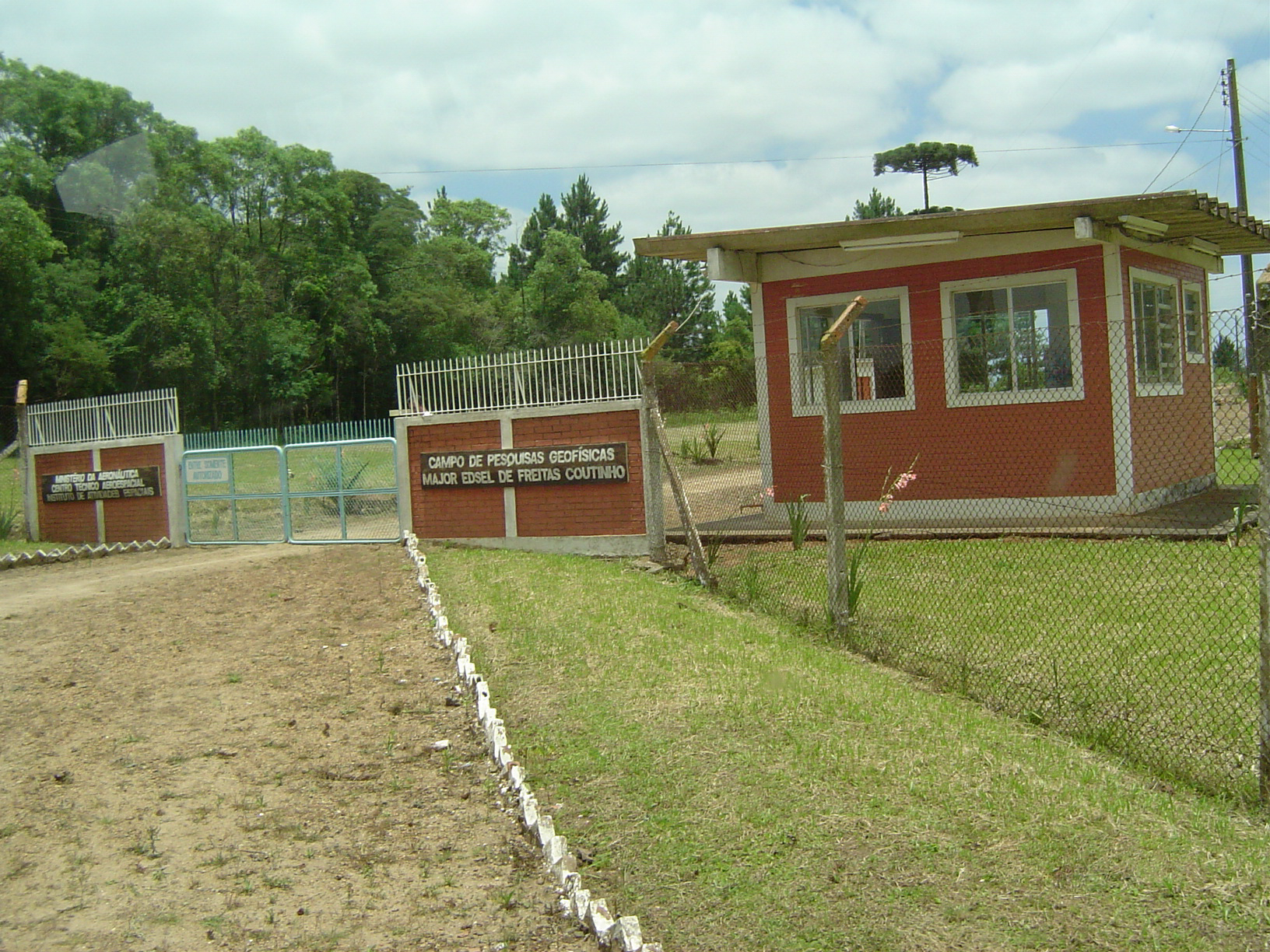 Entrada da Base de Paula Freitas, foto da entrada da Base da Aeronáutica expecializada em pesquisas Geofísicas e Espaciais do Município de Paula Freitas Paraná.